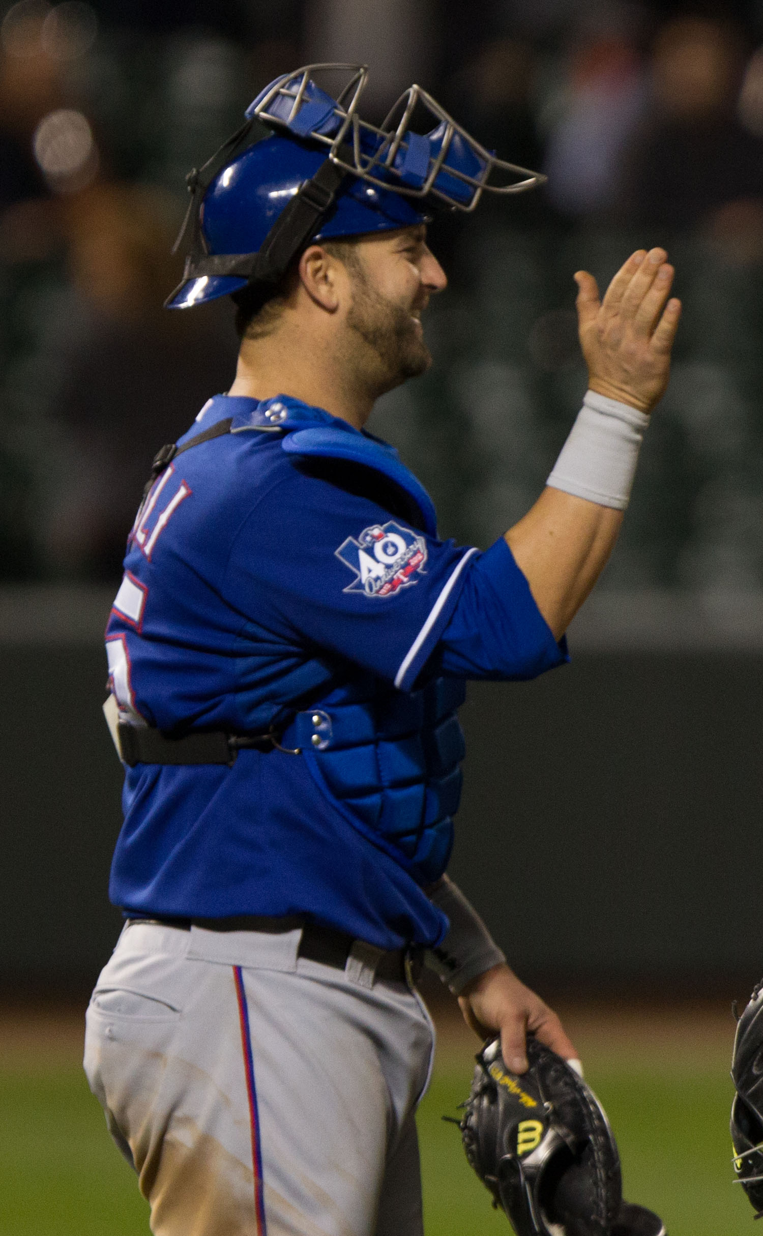 Mike Napoli